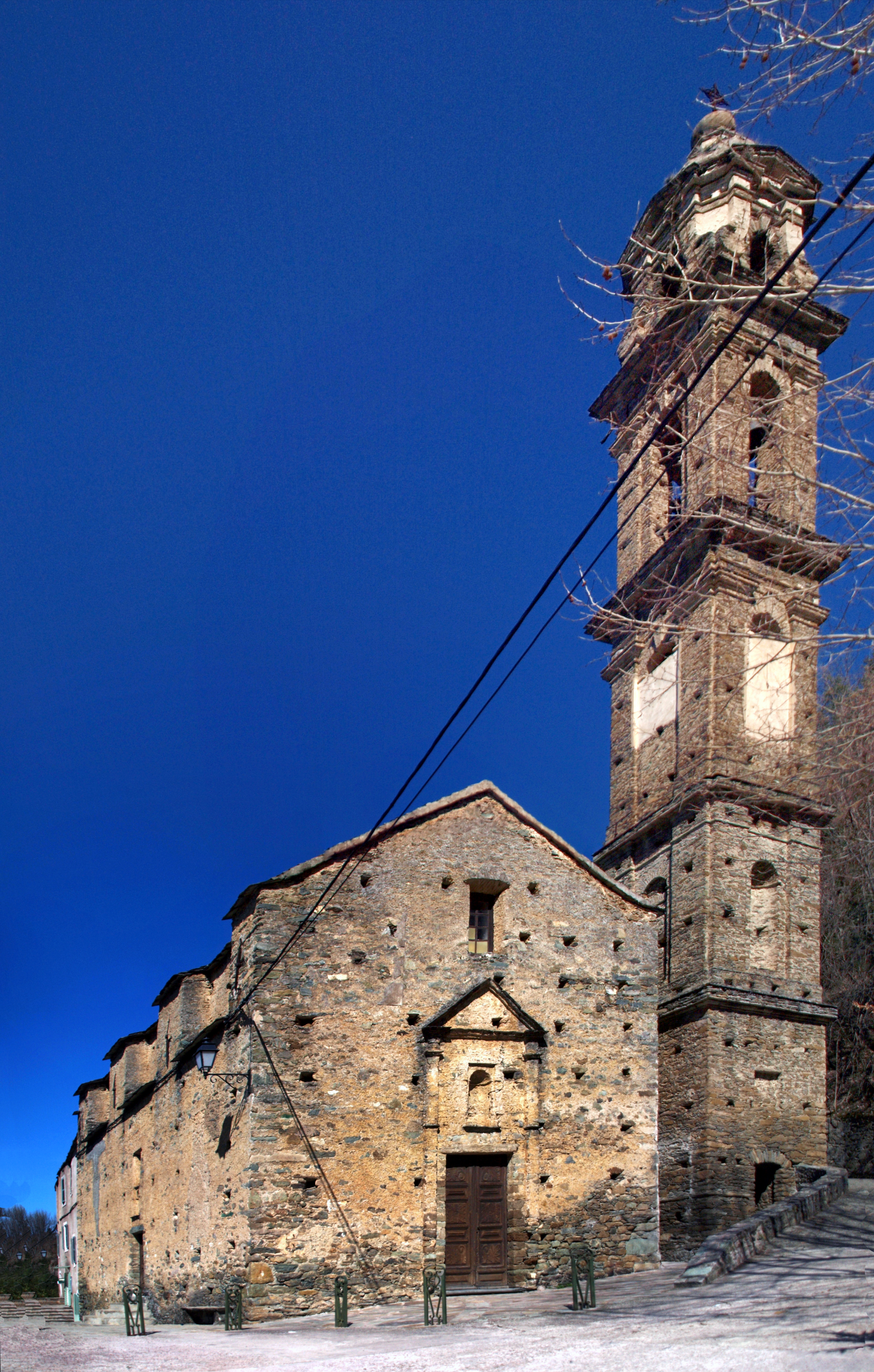 Castello-di-Rostino, Rustinu (Corse) - Église paroissiale Sainte-Marie